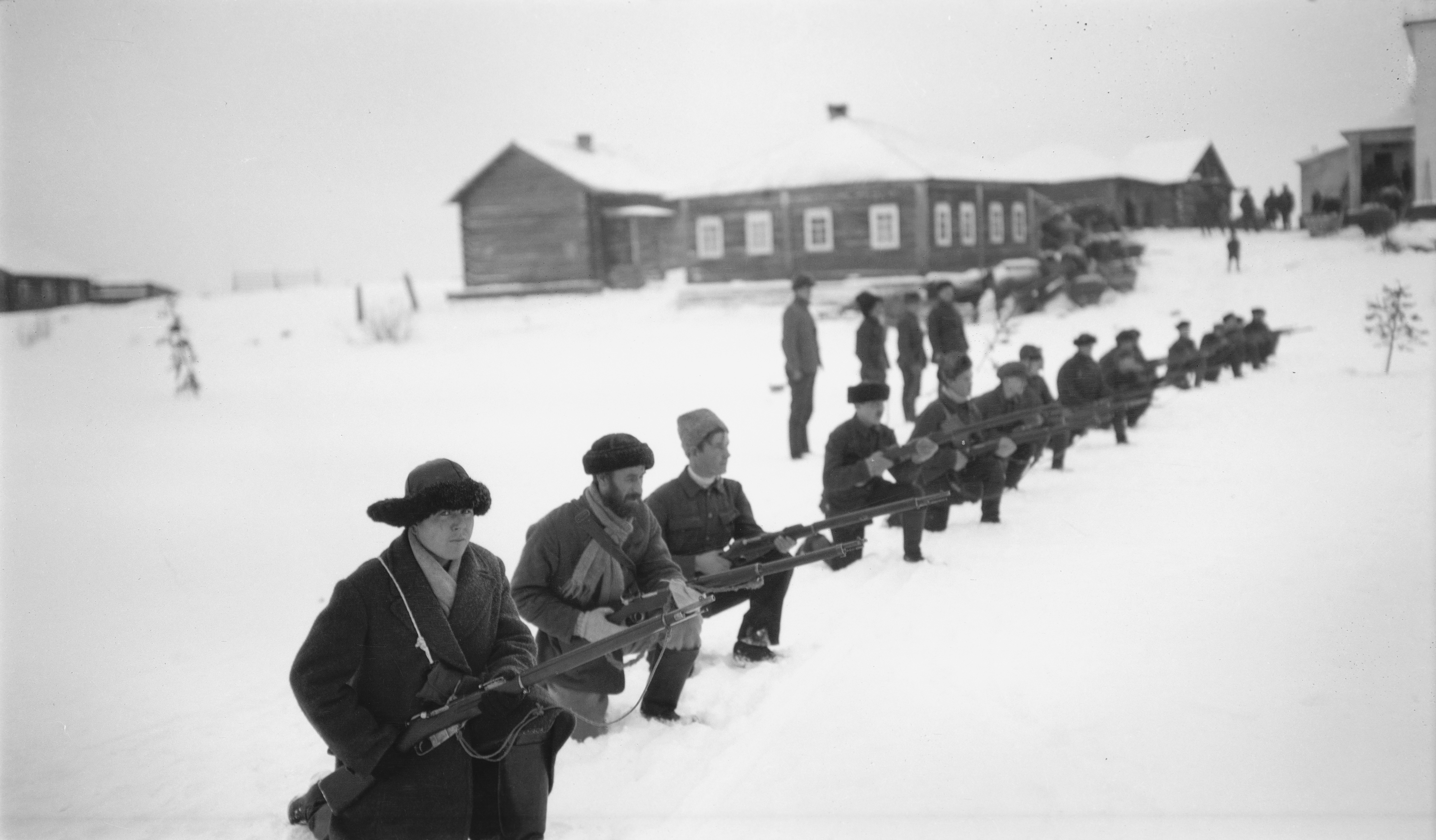 Itäkarjalaisten kansannousu, harjoitus Kiimasjärvellä 1921–1922